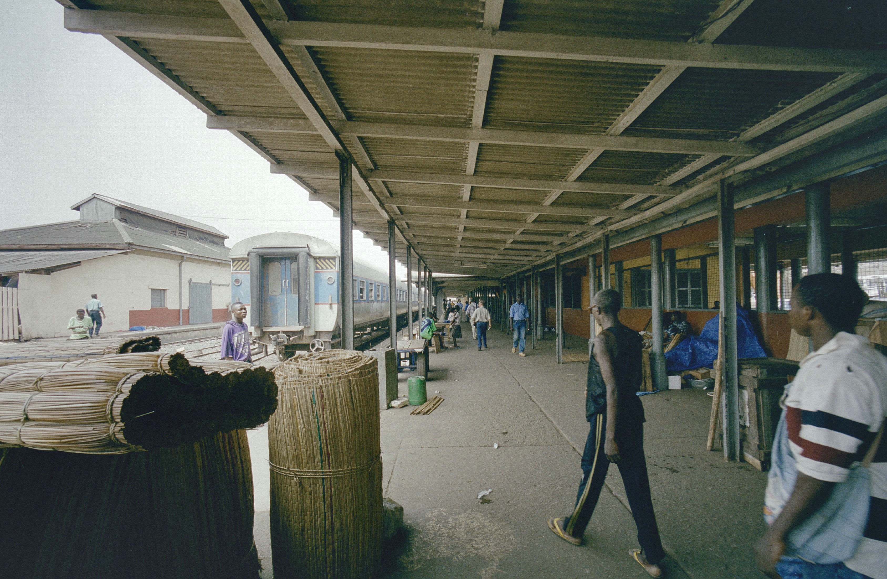 Station: Overzicht perron met overkapping (opmerking: Ghana reis Loek Tangel)